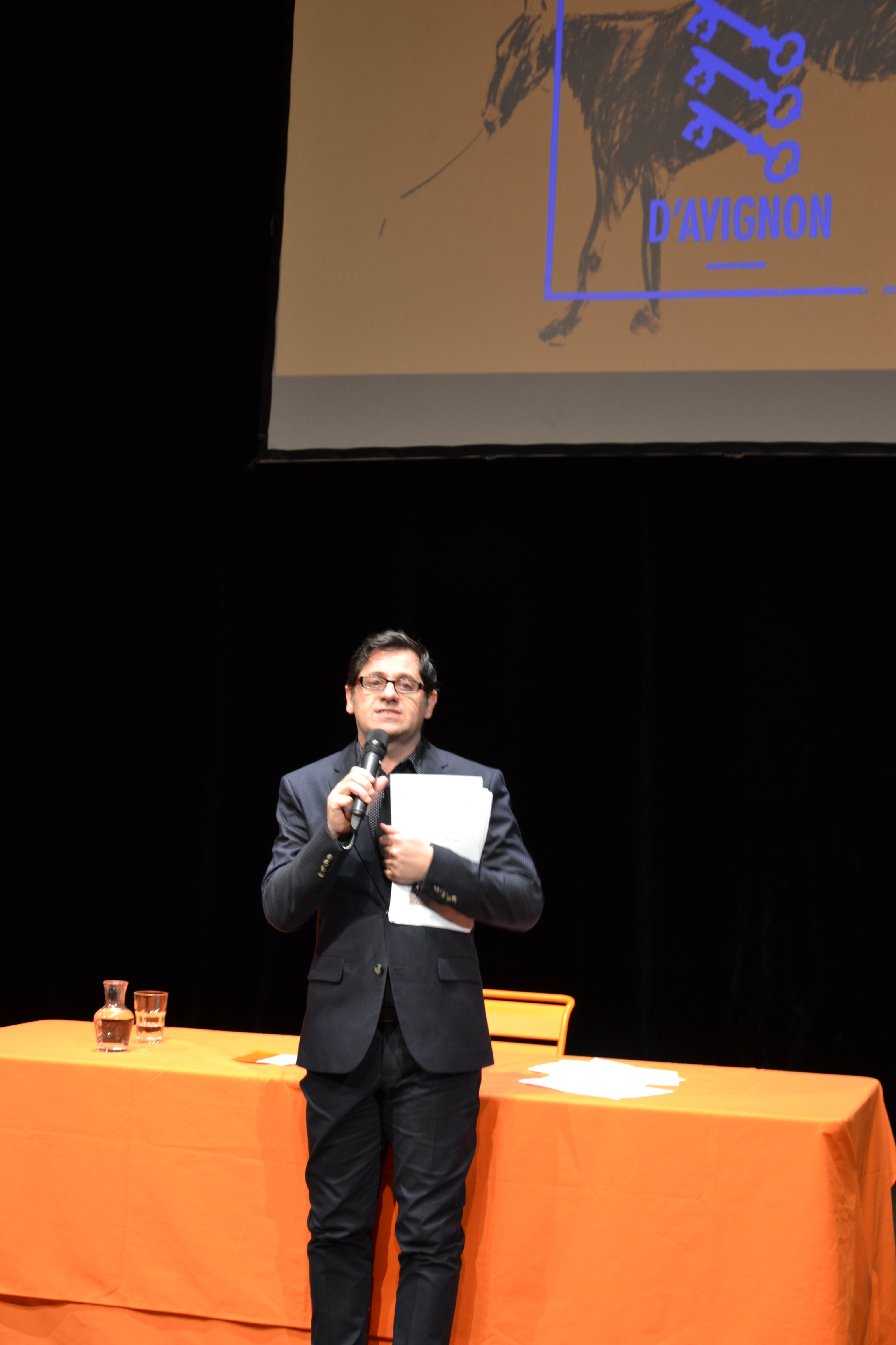 Olivier Py lors de la conférence de presse du Festival d'Avignon 2016 à la FaBricA